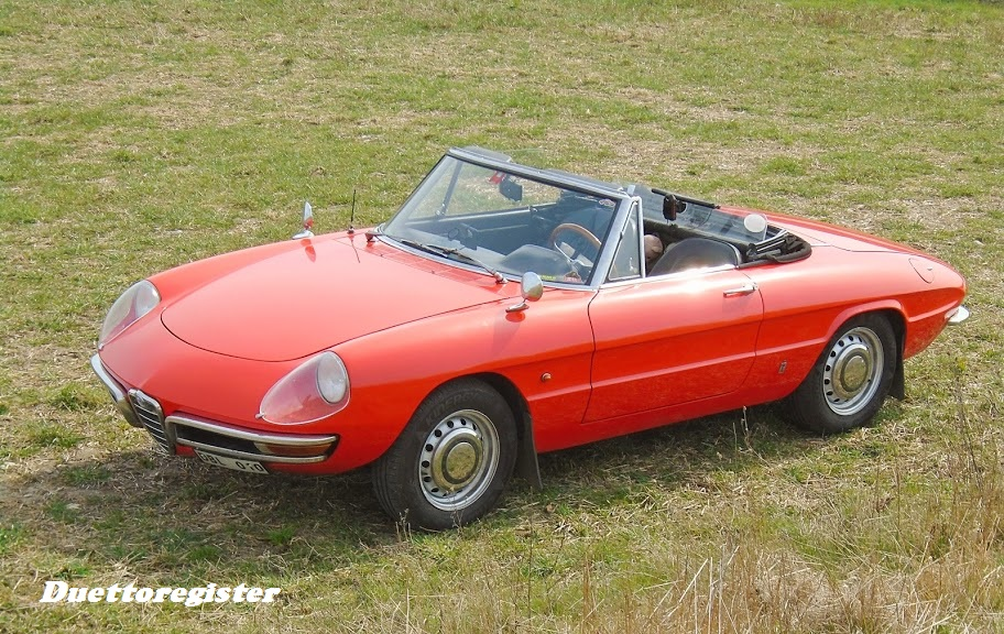 Röd Alfa Romeo Duetto med korrekta hjul och fälgar